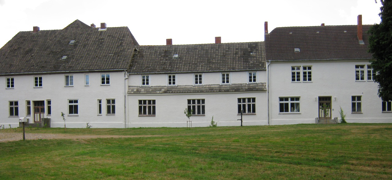 Schloss Klevenow Ostseite